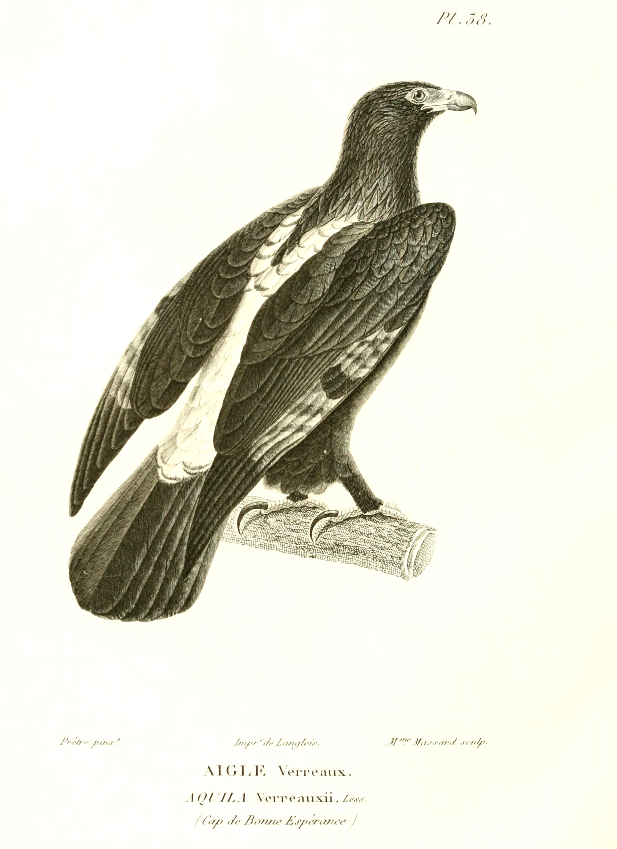 Verraux's Eagle illustration